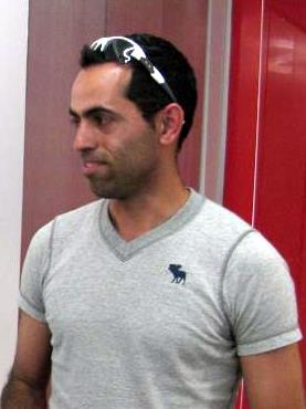 איתי מגידי, אתלט אולימפי בישראל